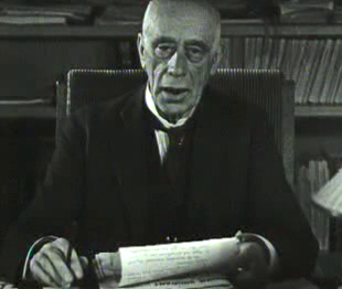 Henri Marchant, Den Haag 1934